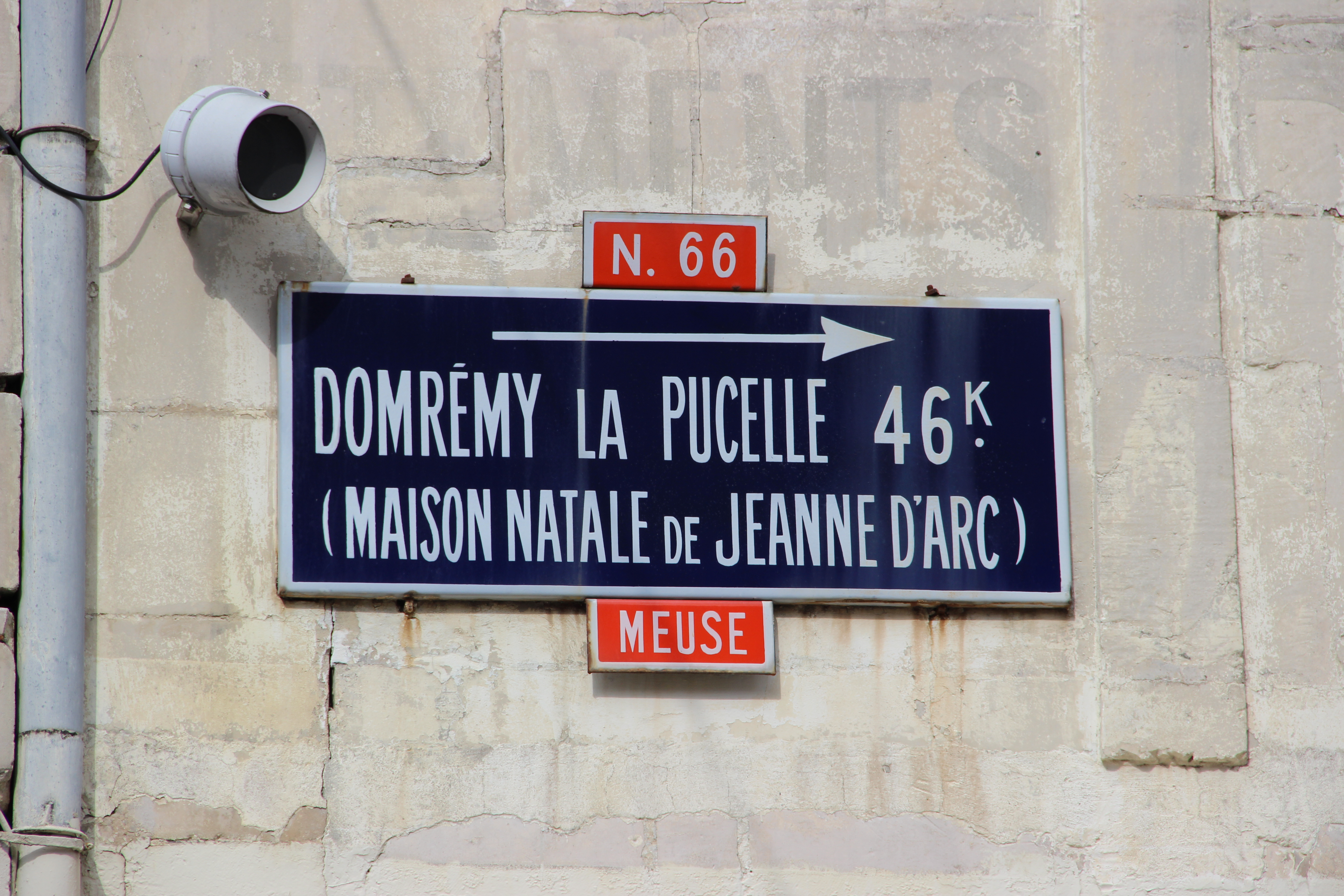 Panneau de l'ancienne Route Nationale 66 qui reliait Bar-le-Duc à Epinal à Ligny-en-Barrois.